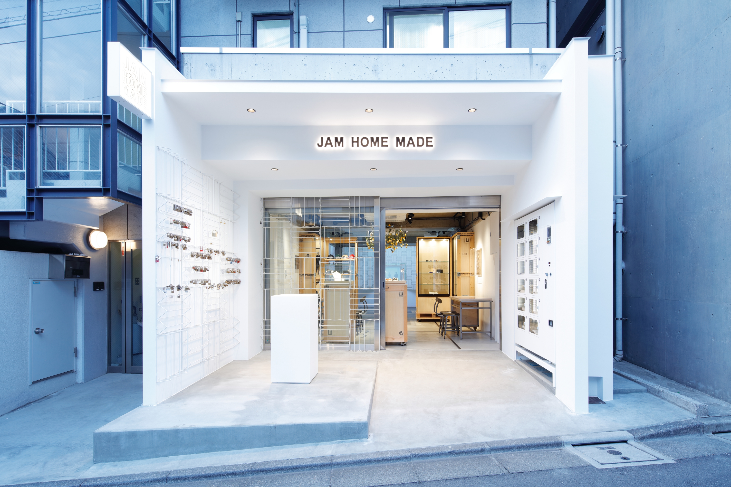 JAM HOME MADE 東京店